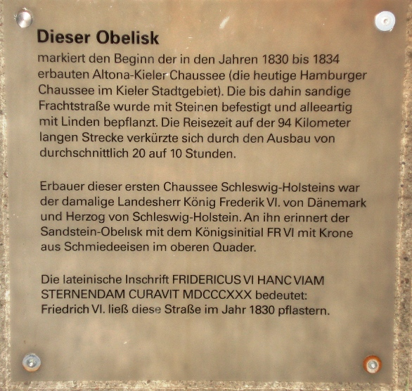 Infotafel an dem Denkmal Altona-Kieler-Chaussee